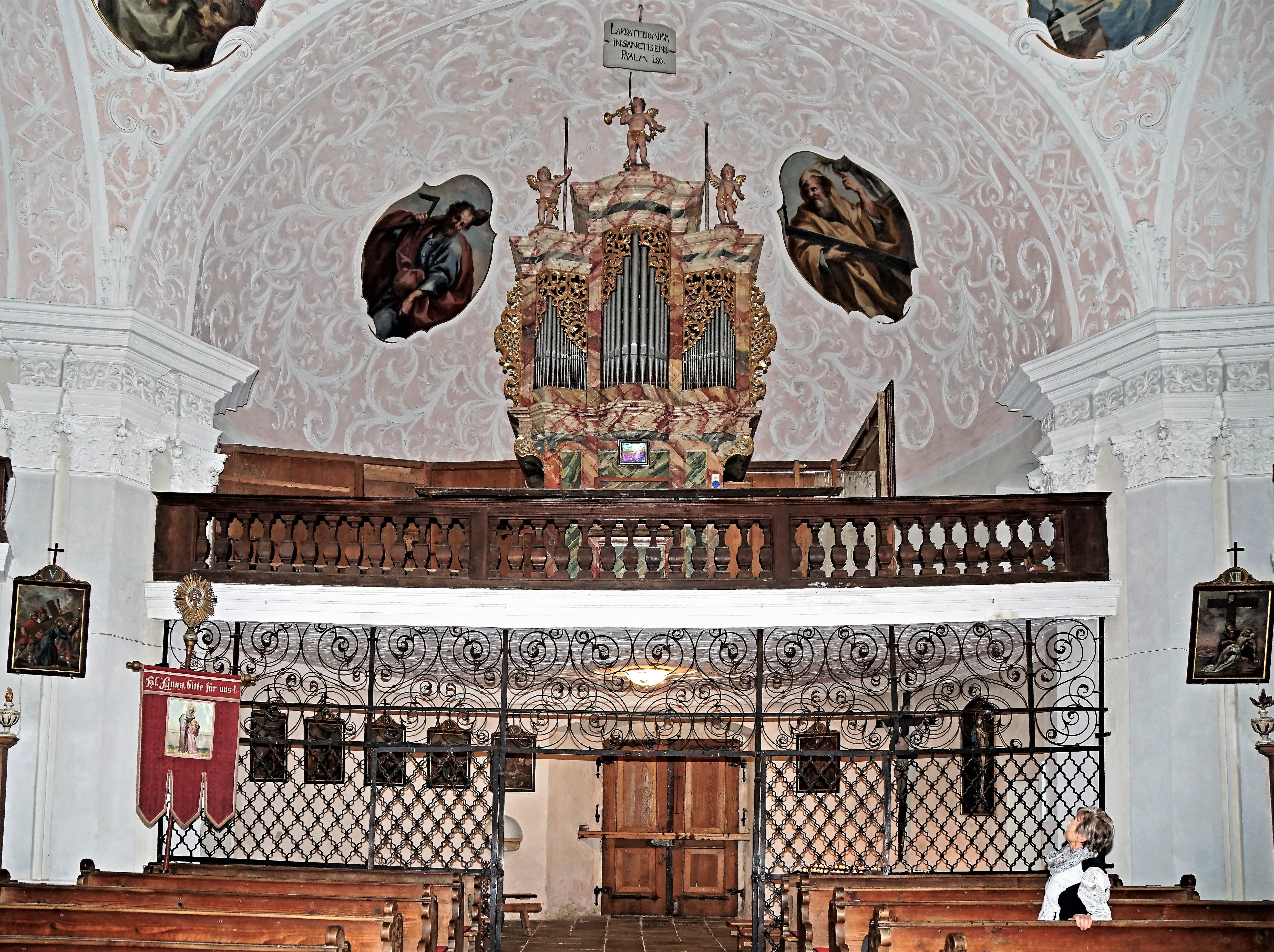 Wallfahrtskirche Maria Hilf, Guttaring, die Orgelempore